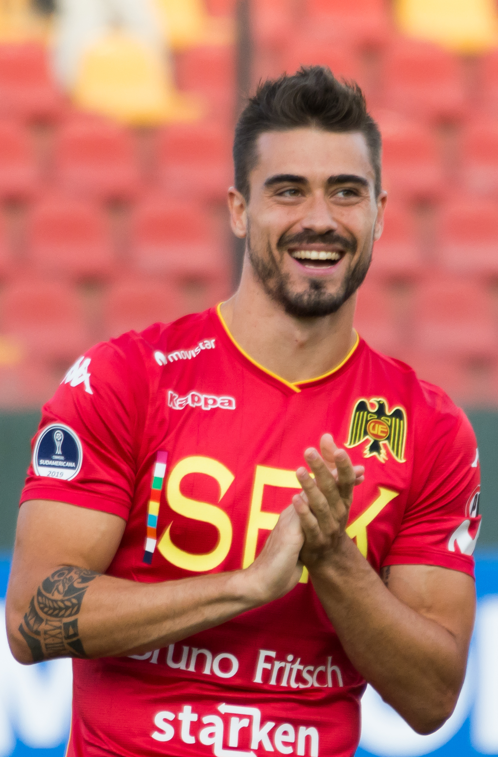 Juan Pablo Gómez, Unión Española v Mushuc Runa, Estadio Santa Laura, Independencia, Santiago, Región Metropolitana, Chile.